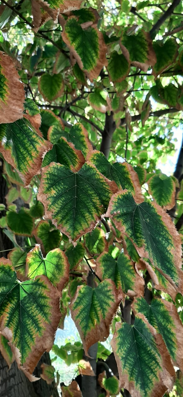 Planta de tilo, cuyas hojas empiezan a recibir al otoño. Choque y contraste de colores.